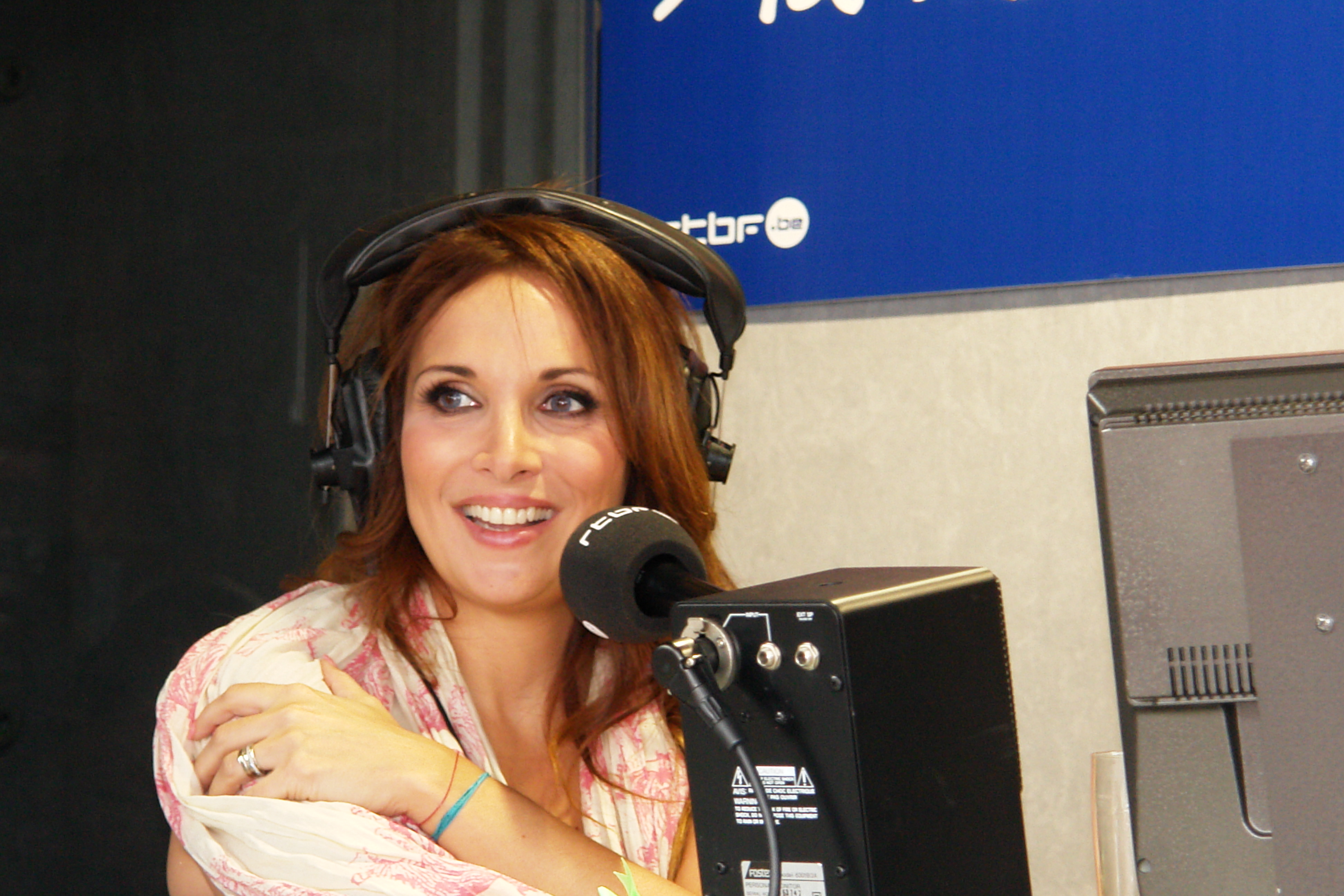 En interview au beau vélo de Ravel en Belgique (2012)